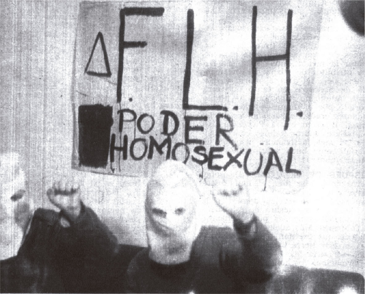 Dos miembros del Frente de Liberación Homosexual ("Dino y Germán") posan encapuchados para un reportaje de la revista Panorama del 24 de agosto de 1972, titulado "Vida cotidiana. Homosexualidad: las voces clandestinas".